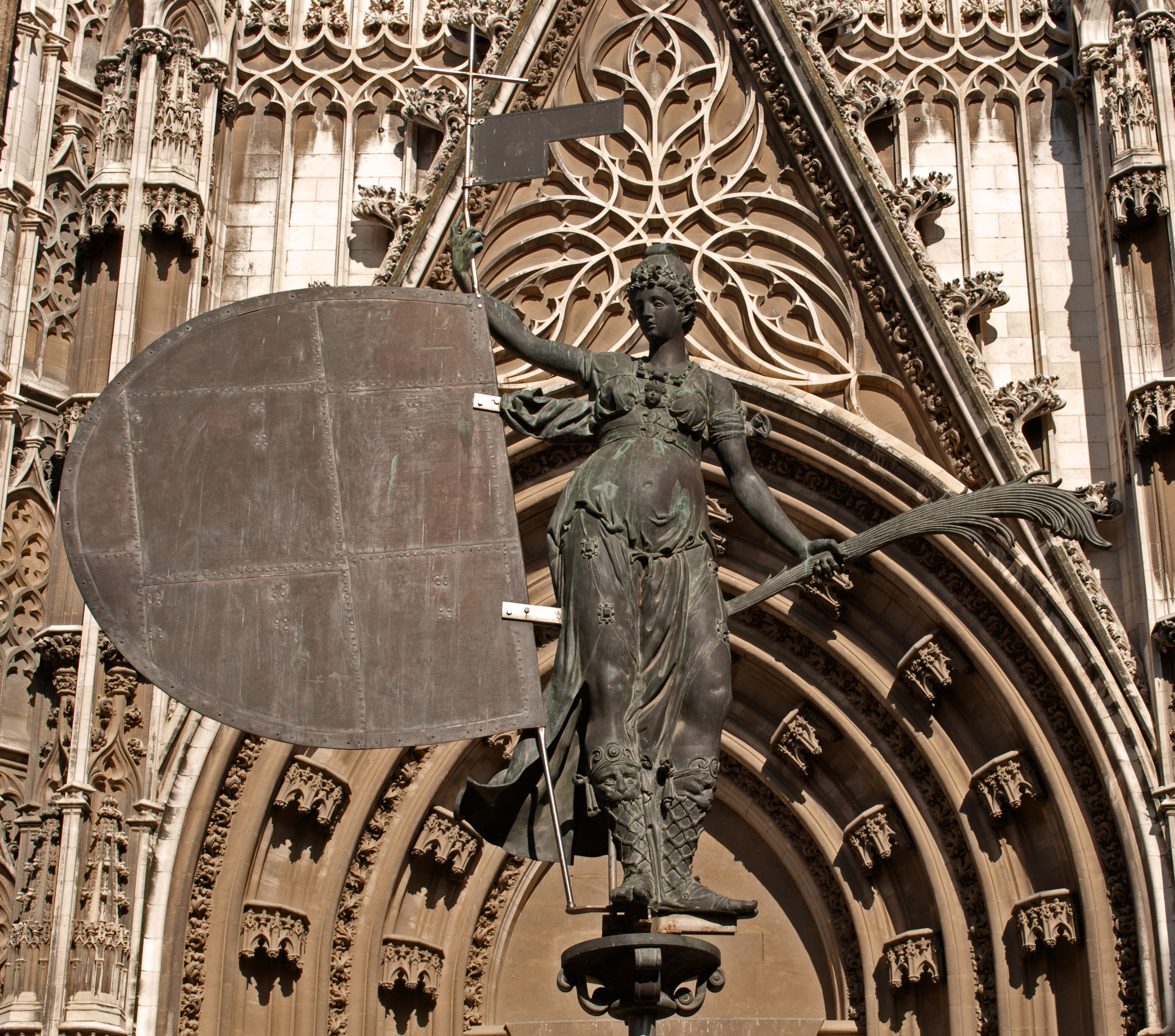 Estatua de La Fe «el Giraldillo», copia a pie de calle del remate de la Giralda. (Sevilla)